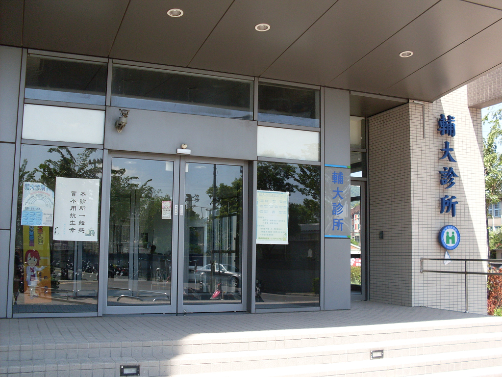 中文（台灣）: 輔大診所